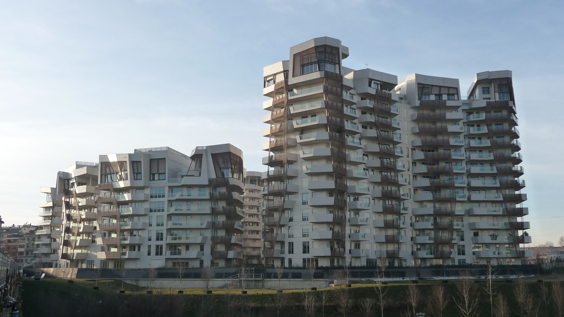 Le Residenze Libeskind facenti parte del Progetto CityLife